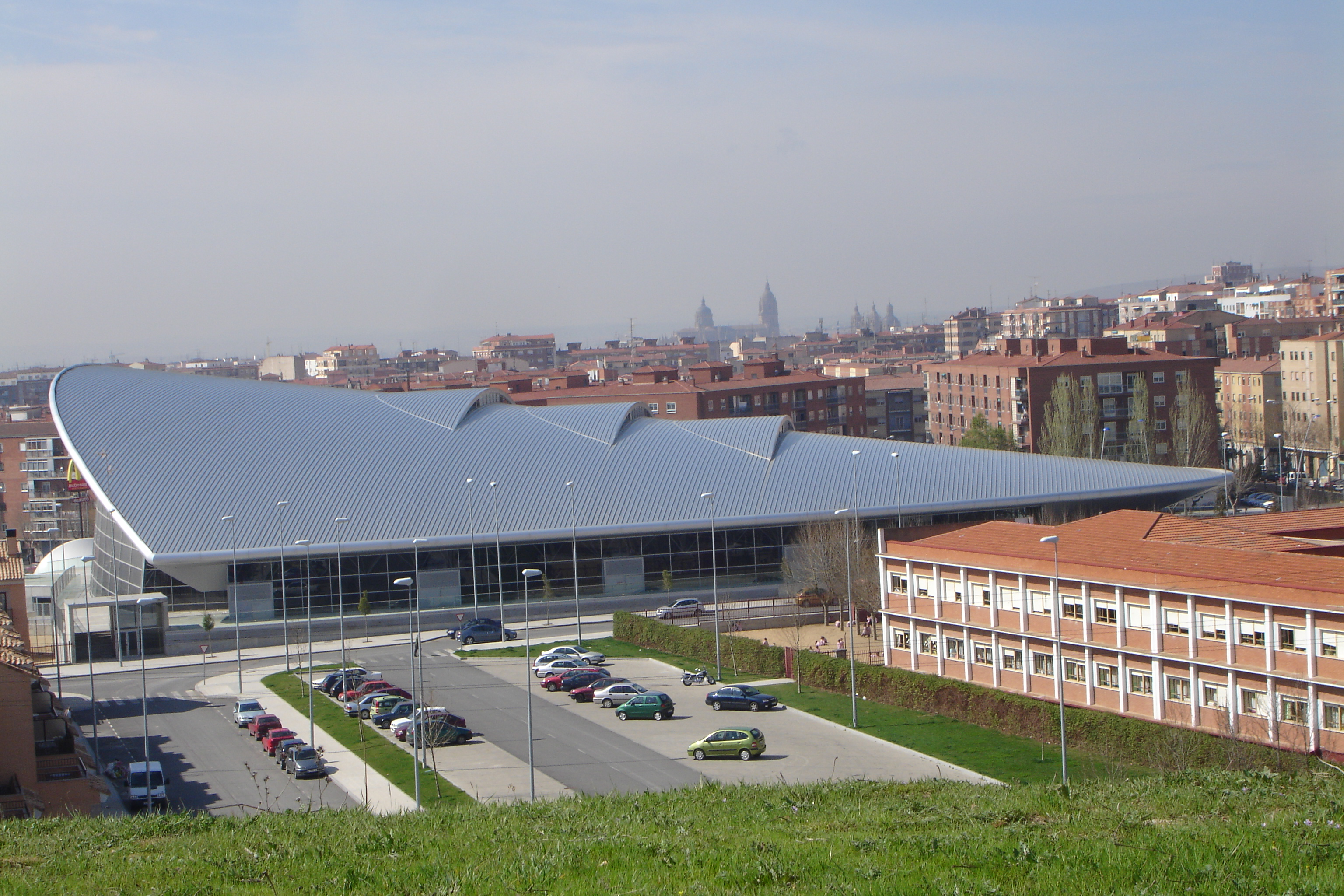 Multiusos Sanchez Paraiso. Salamanca